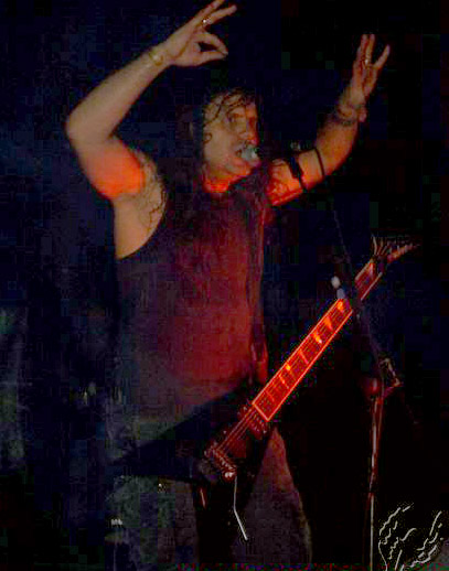 Kreator in concerto